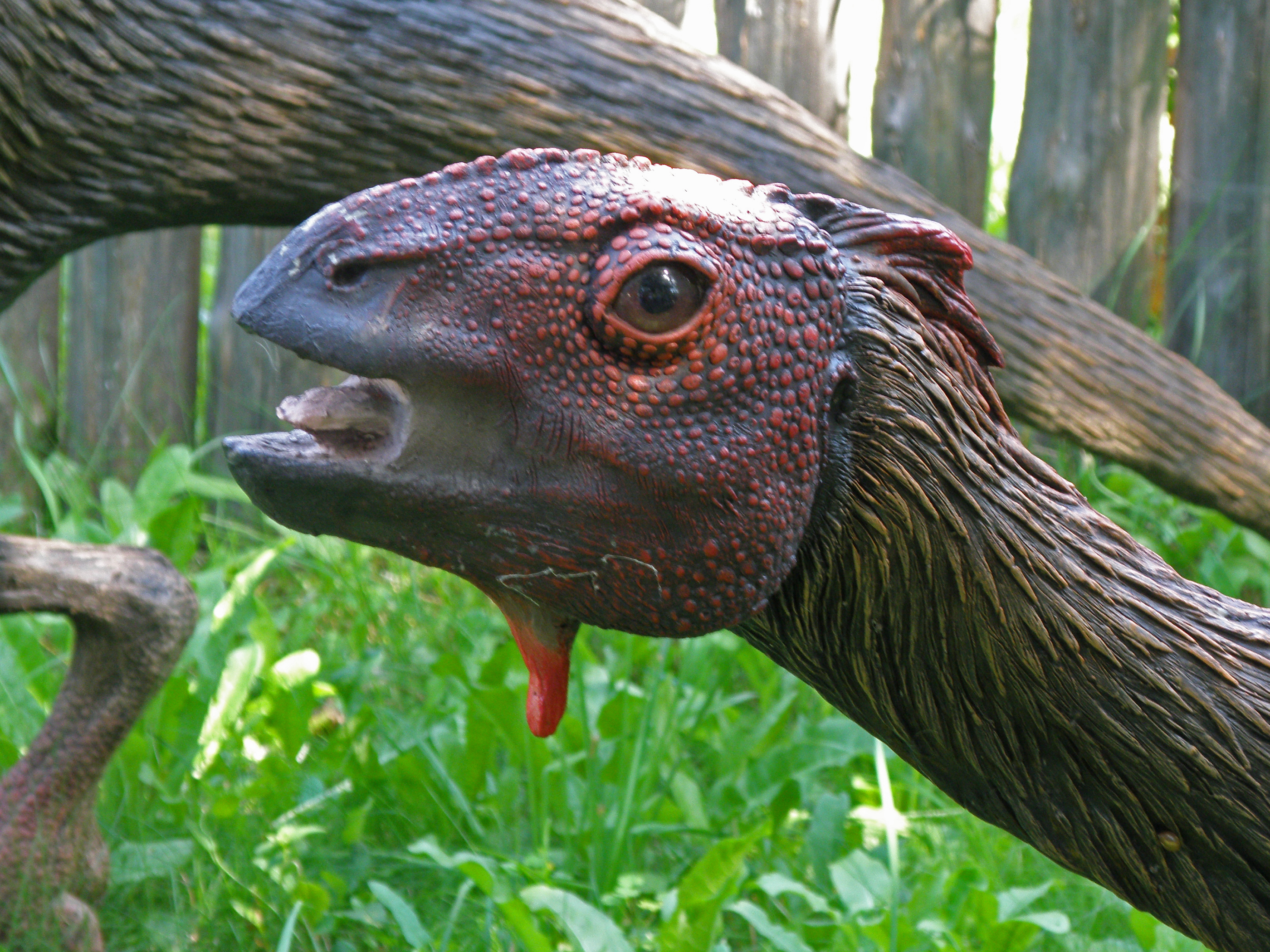 JuraPark Bałtów - Park Dinozaurów - Driozaur (Dryosaurus)